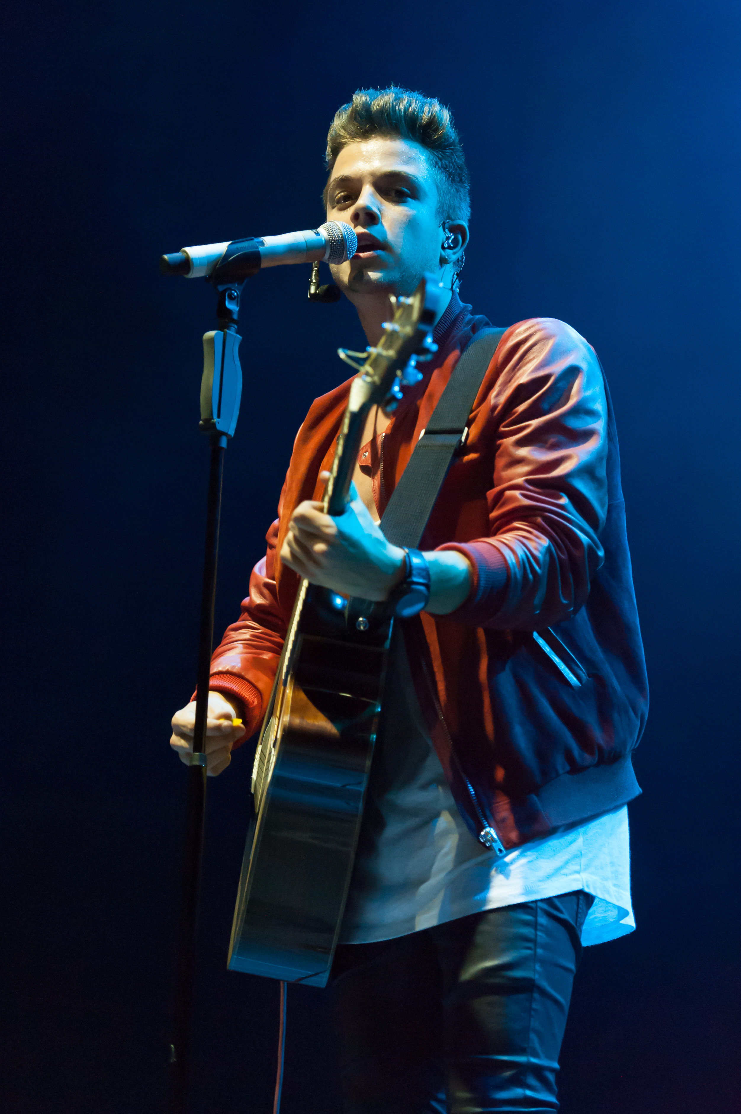 DSDS - Live on Tour 27. Juli 2014, Stadthalle Wien Luca Hänni